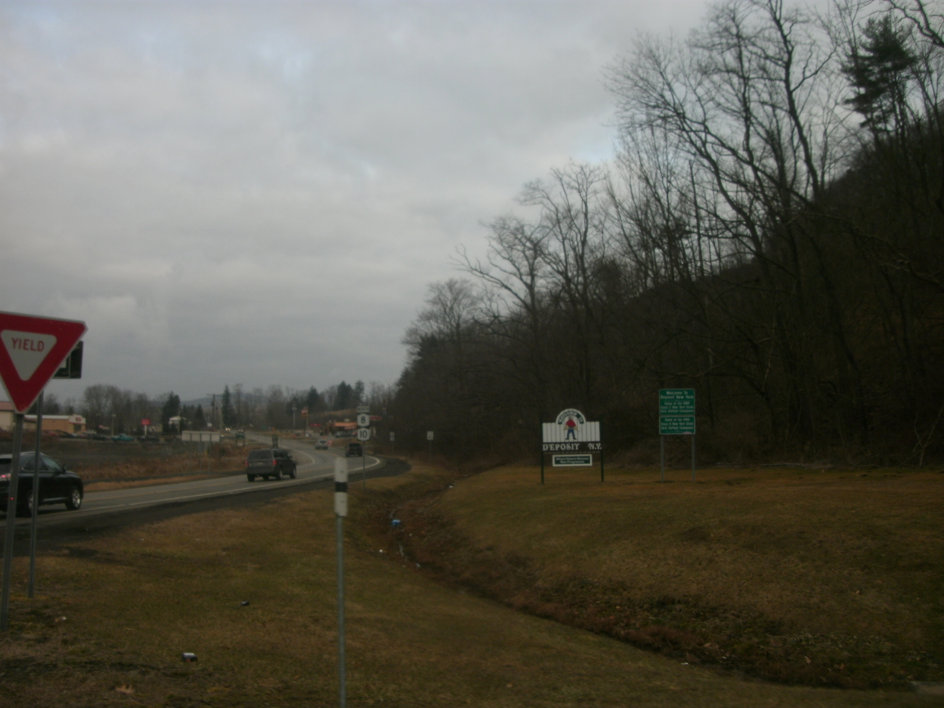 Ge digital camera